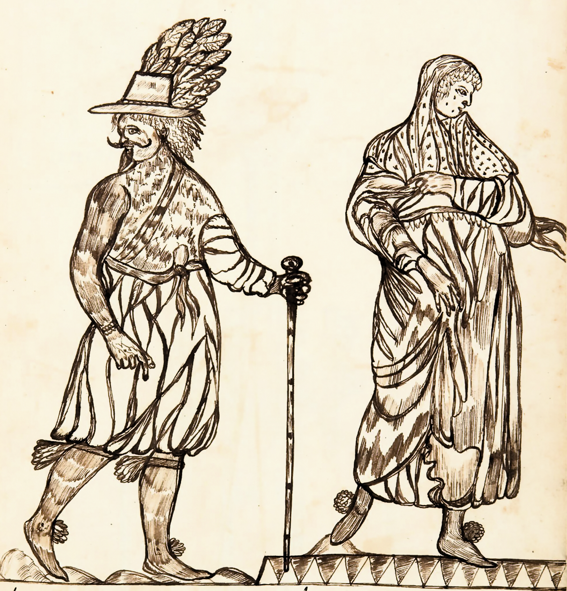 Jacques Cartier, marin de St-Malo fut envoyé en Nouvelle-France par François 1er Roi de France et de Navarre, qui le nomma chef d'escadre pour aller découvrir la situation du fleuve St-Laurent et de la Nouvelle-France, illustration du Codex canadensis, ca. 1675-82. Codex canadensis, p. 68; image rognée et rehaussée. Jacques quartier matelot de st. malo qui furent envoyes / En nouvelle france par d'heureuse memoire francois premier / Roy de france et de Navarre qui le fit chef descadre pour / aller decouvrir la scituation du fleuve de st. Laurans et de / la nouvelle france""